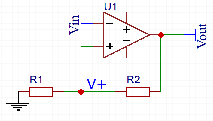 Sümmeetriliste lävenditega inverteeriv Schmitt Trigger